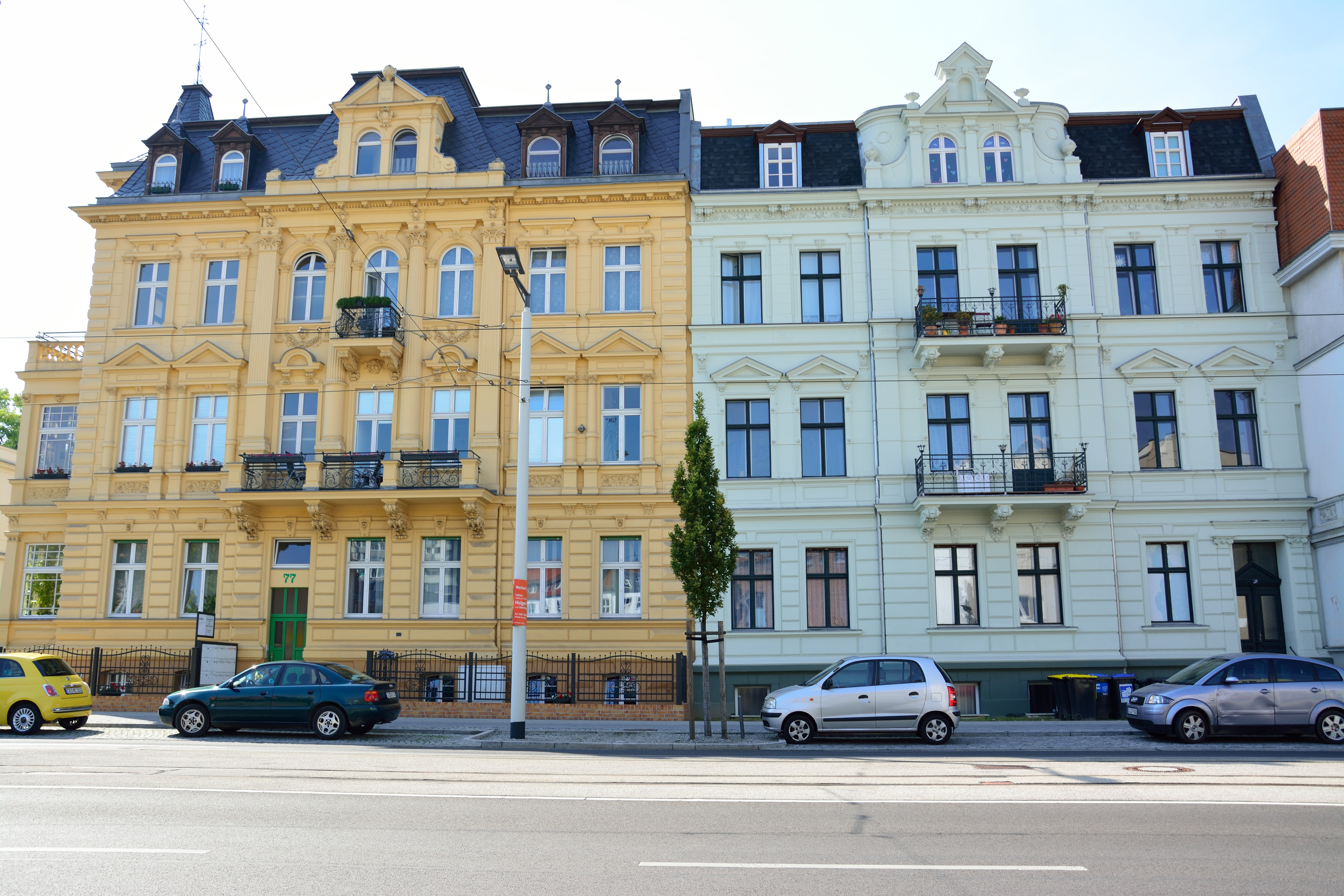 77 - 78 Bahnhofstrasse 2014